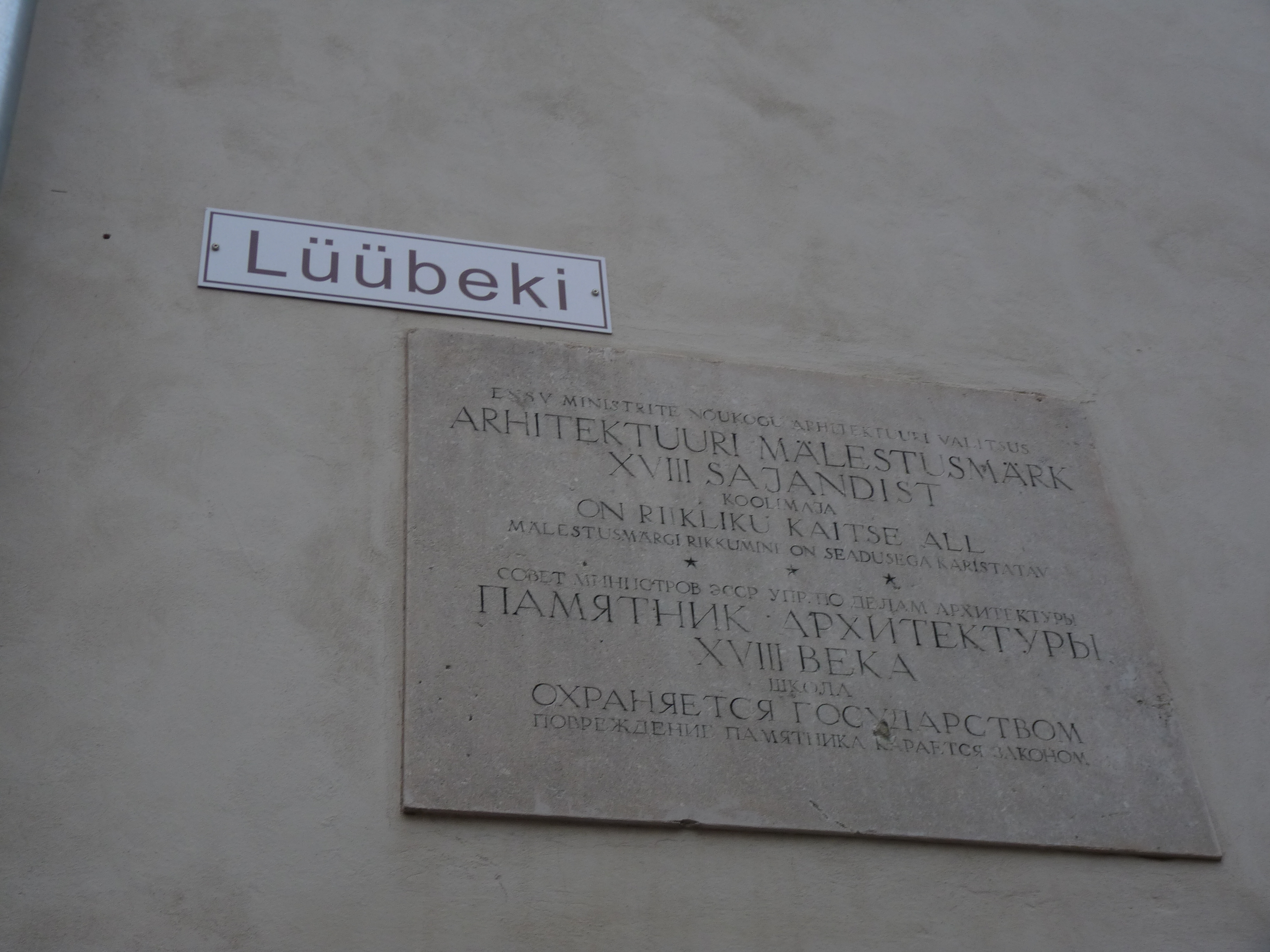 Lüübeki tänavasilt ja mälestusmärgi infotahvel Hugo Treffneri Gümnaasiumi hoone seinal Lüübeki ja Rüütli tänava nurgal Tartus, 23. oktoober 2012